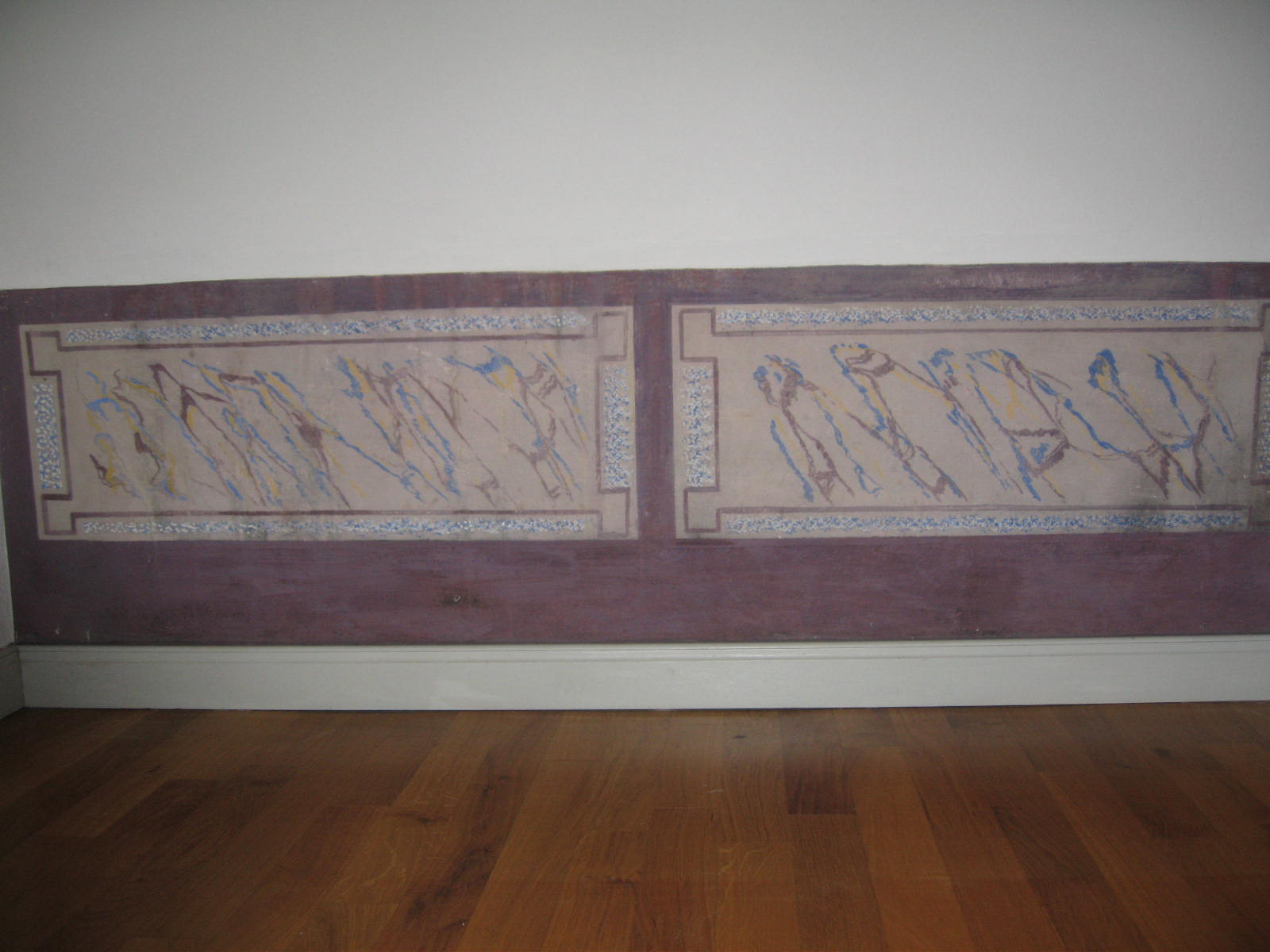 Lambris groß